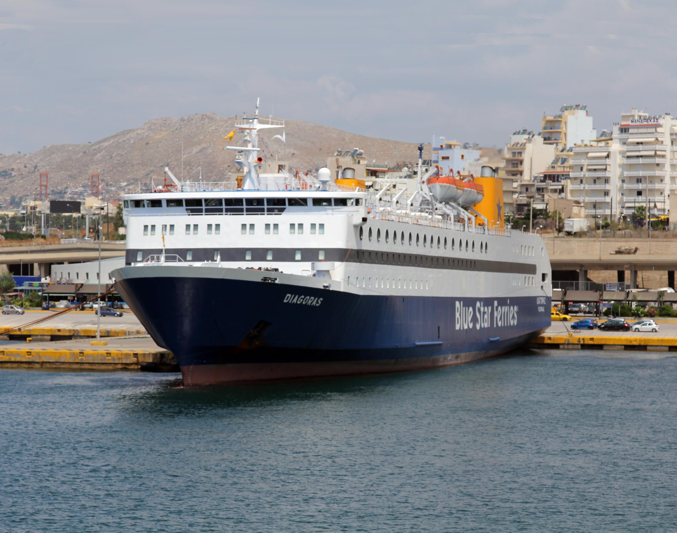 Blue Star Ferries 'Diagoras'